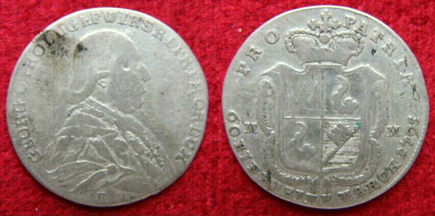 20 Kreuzer 1795, Münzvorder- und -rückseite mit Portrait und Wappen des Bamberger und Würzburger Fürstbischofs Georg Karl von Fechenbach (1749-1808)